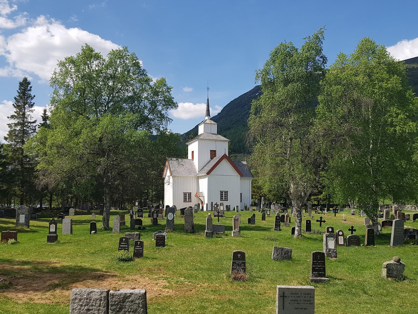 Rauland kirke og kirkegård